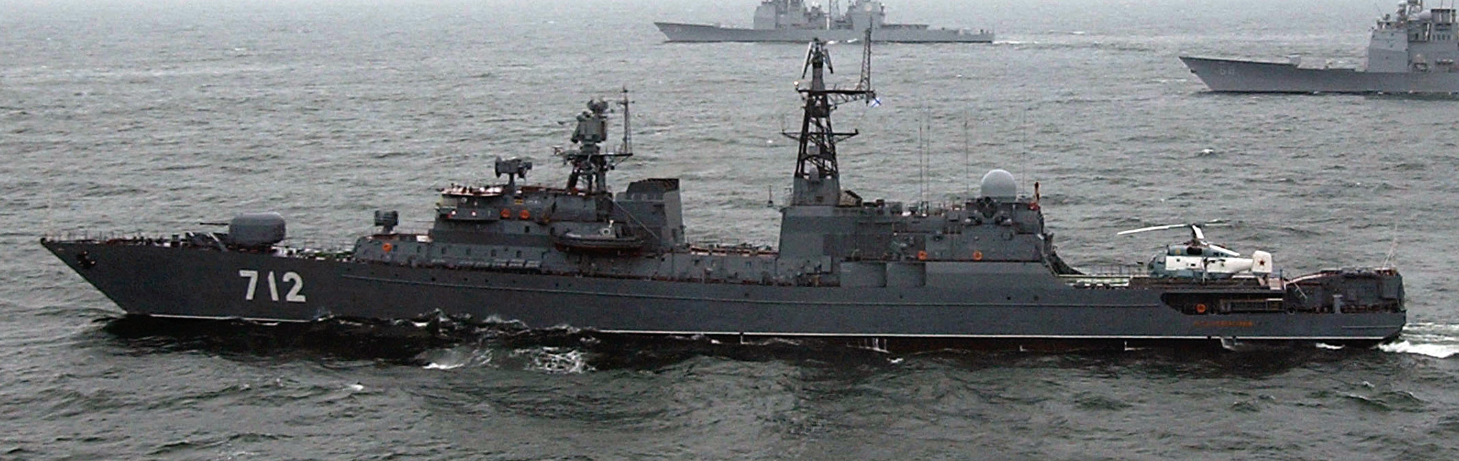 Russian Frigate NEUSTRASHIMY